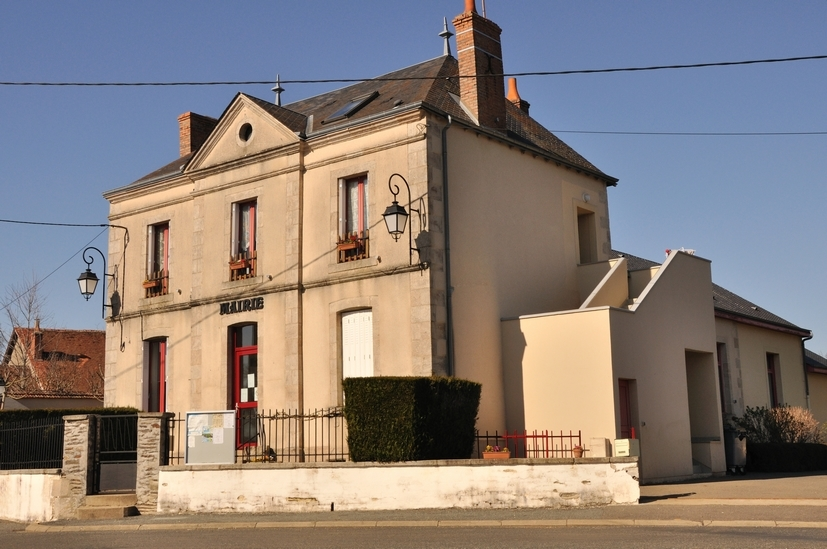 Vigoulant (Indre) - L'ancienne mairie